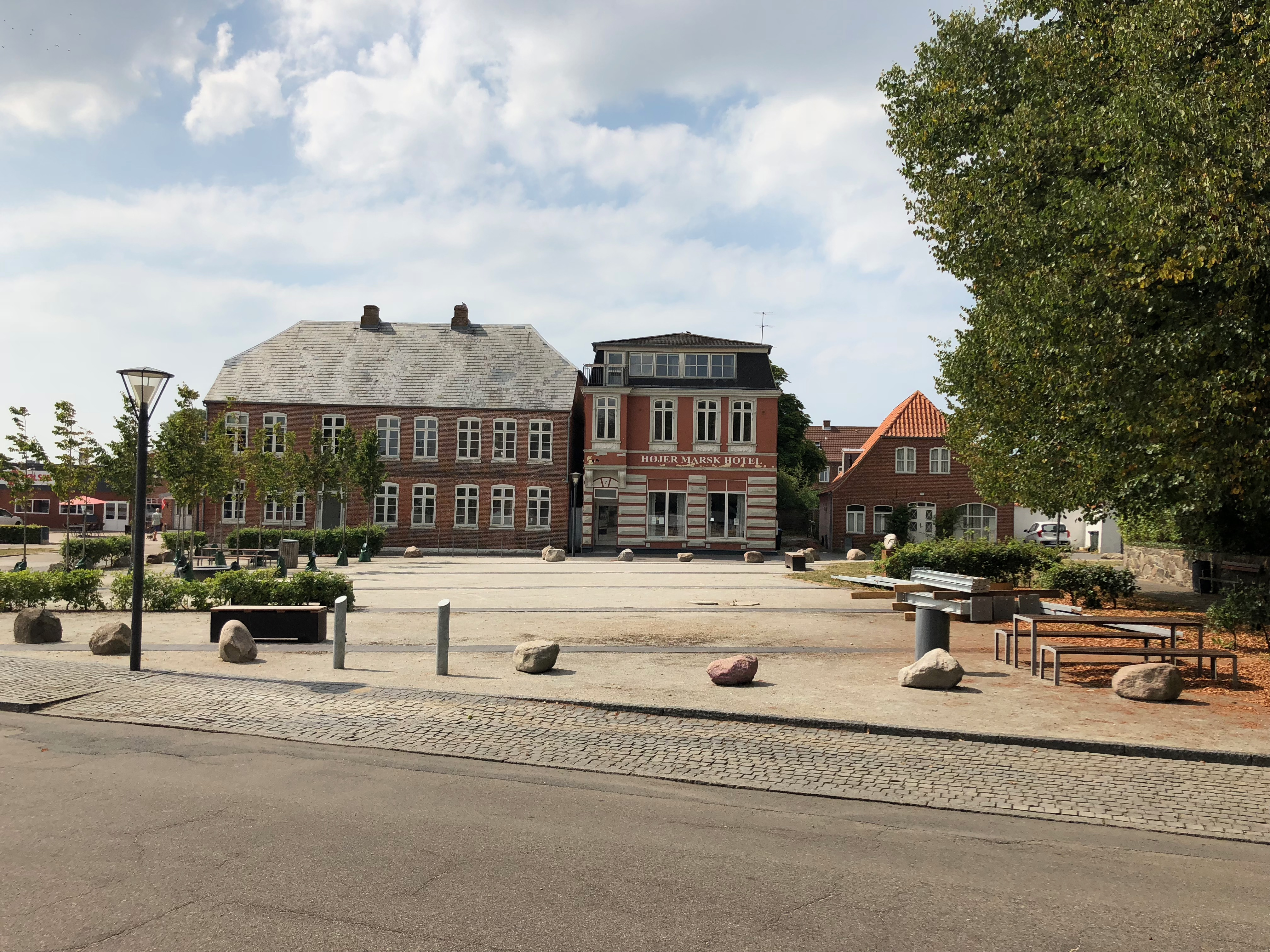 Marskhotellet ligger på torvet i Højer.